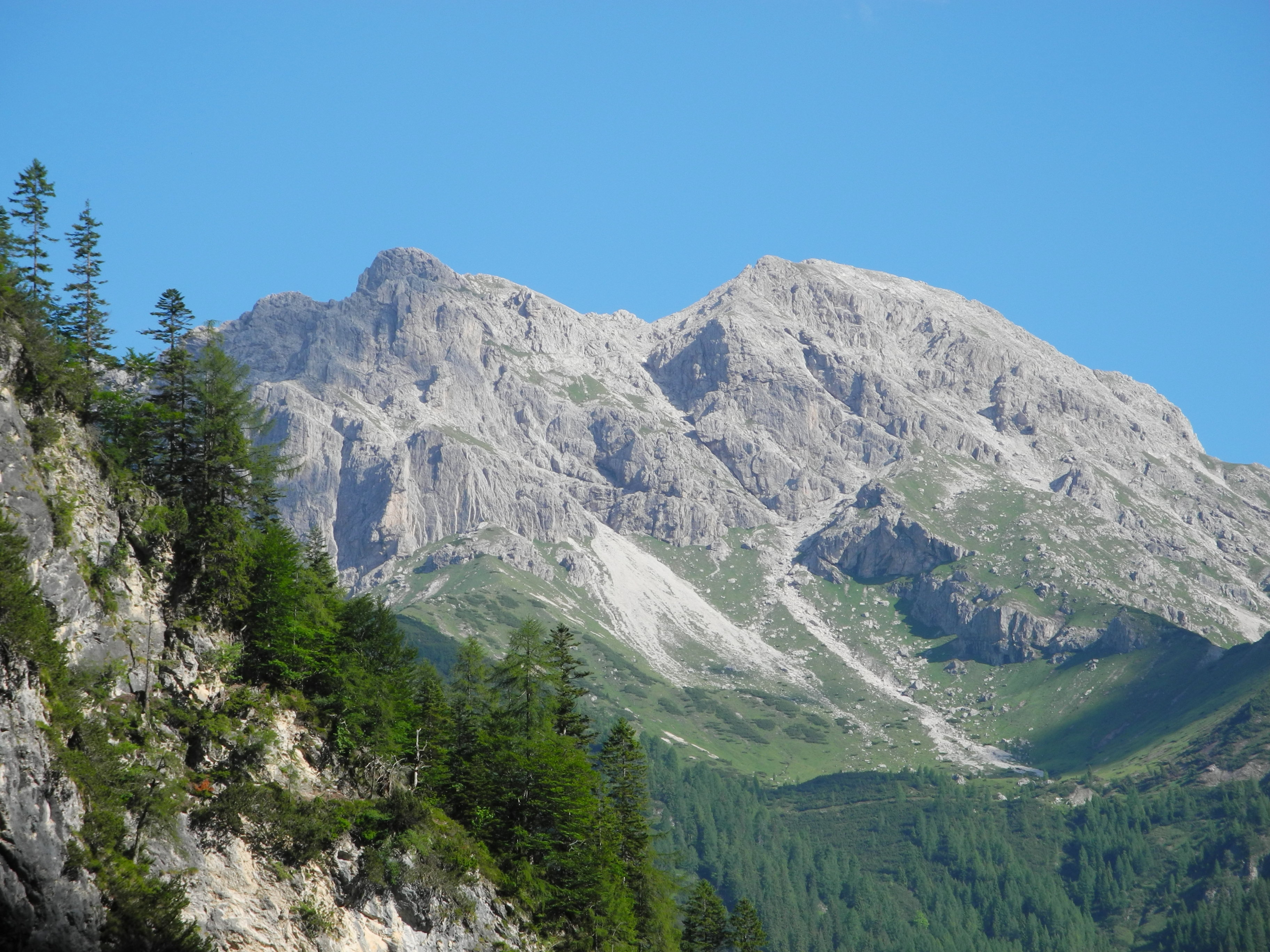 Il Monte Pramaggiore (PN), dalla salita al bivacco Goitan